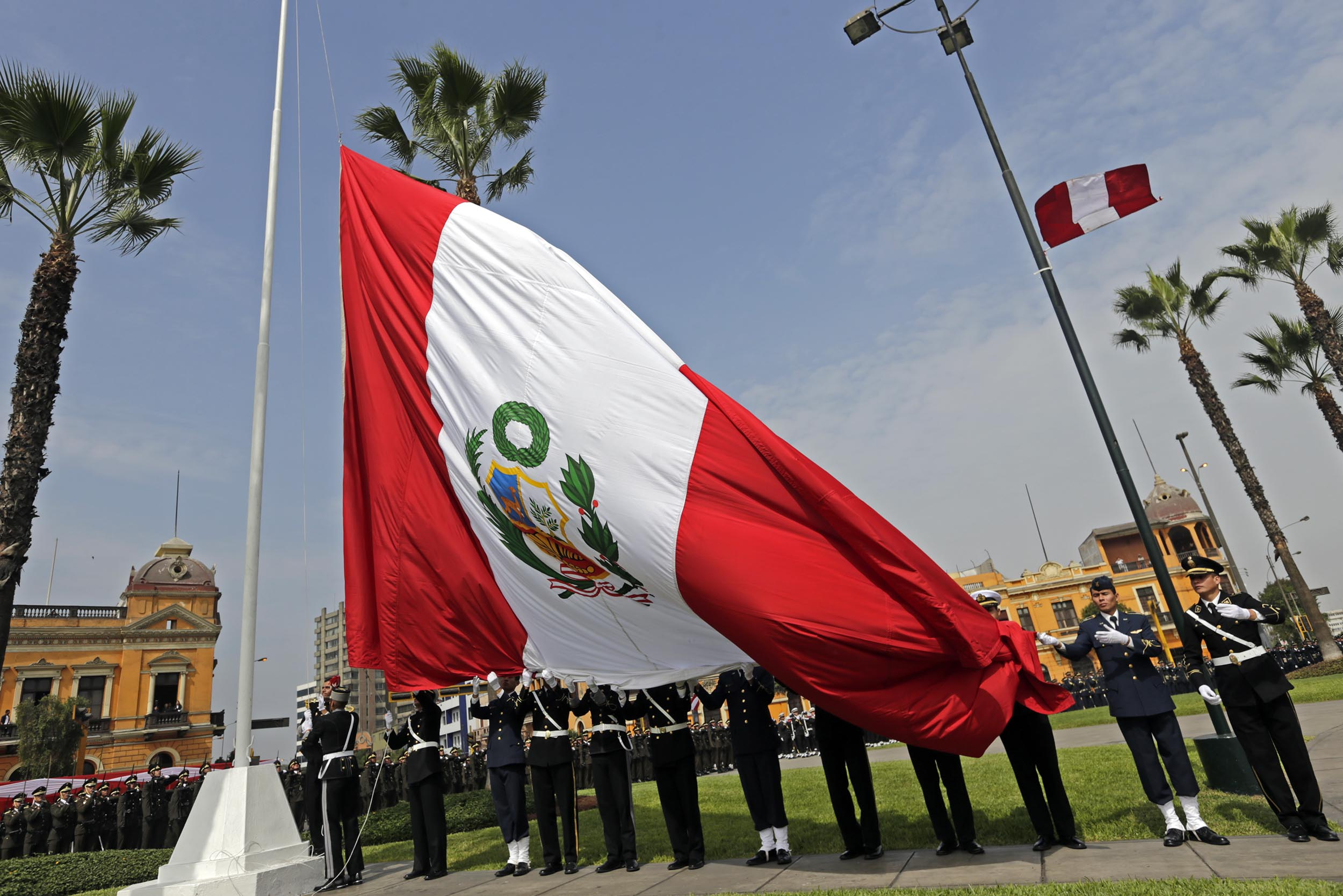 El ministro de Defensa, Pedro Cateriano Bellido, participó esta mañana en la ceremonia de conmemoración por el 133 aniversario de la Batalla de Arica y de renovación del juramento de fidelidad a la Bandera por parte de las Fuerzas Armadas.